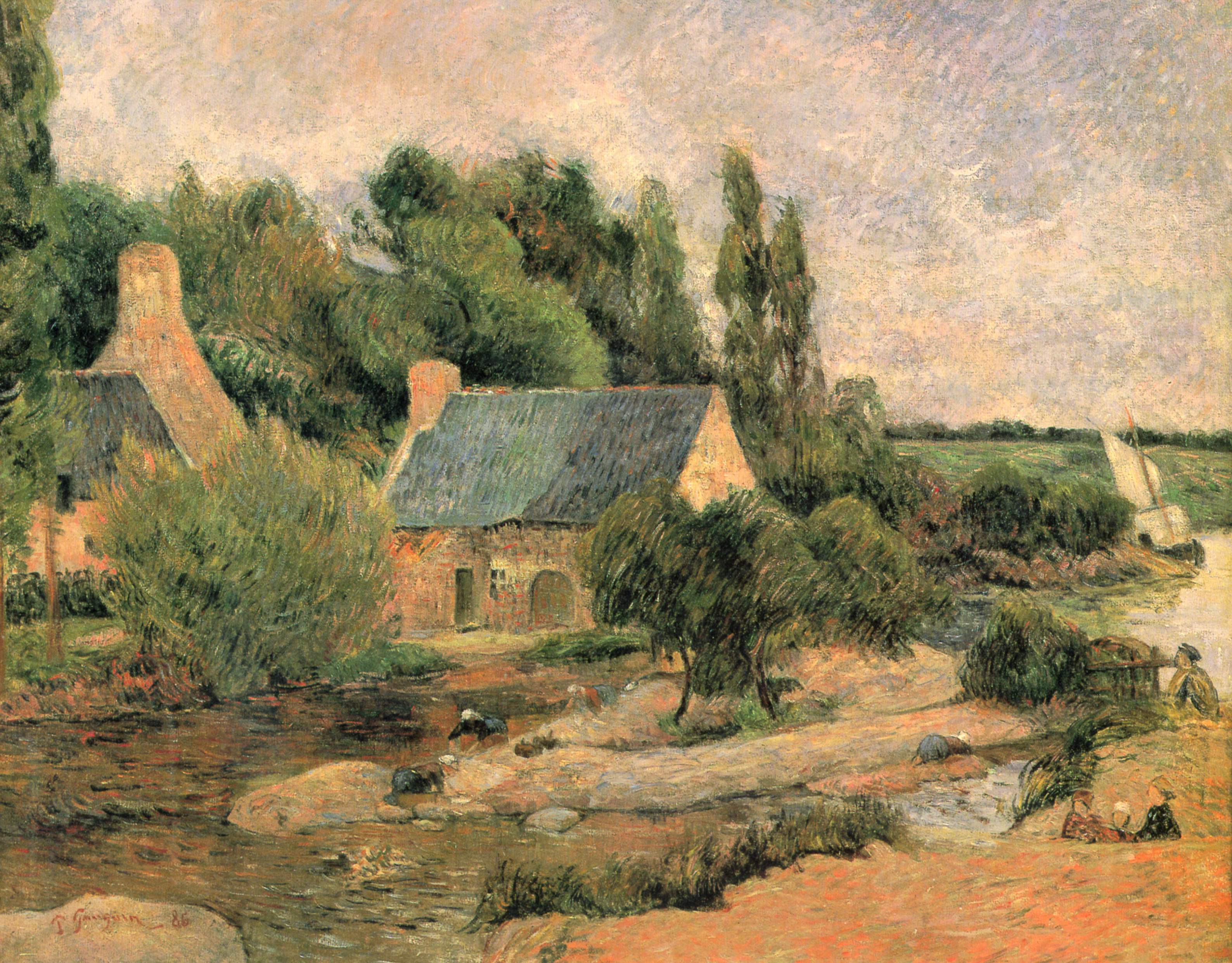 Le moulin peint est le moulin Ty Meur, dit aussi moulin Saint-Guénolé, du nom de la colline qui le surplombe. C'était le dernier moulin de la rive gauche avant la mer et l'avant-dernier des 14 moulins de la ville. Il subissait l'action de la marée, ce qui réduisait son temps de mouture. La proximité du port est évoquée par la présence d'un bateau sous voiles à quai.